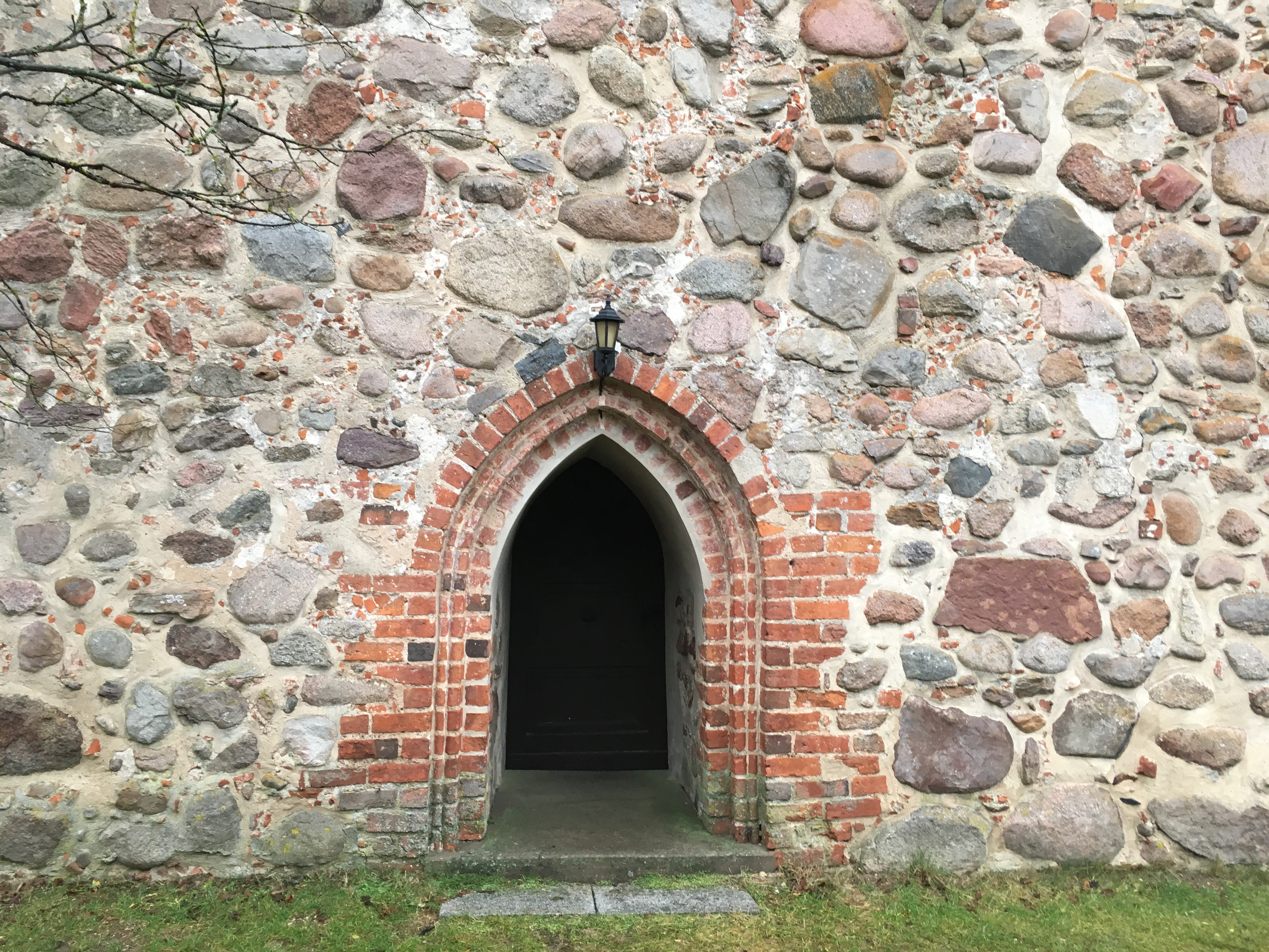 Die Feldsteinkirche in Schweinrich, Wittstock/Dosse entstand vermutlich im 15. Jahrhundert. Im Innern steht unter anderem ein Altarretabel aus dem ersten Viertel des 17. Jahrhunderts.